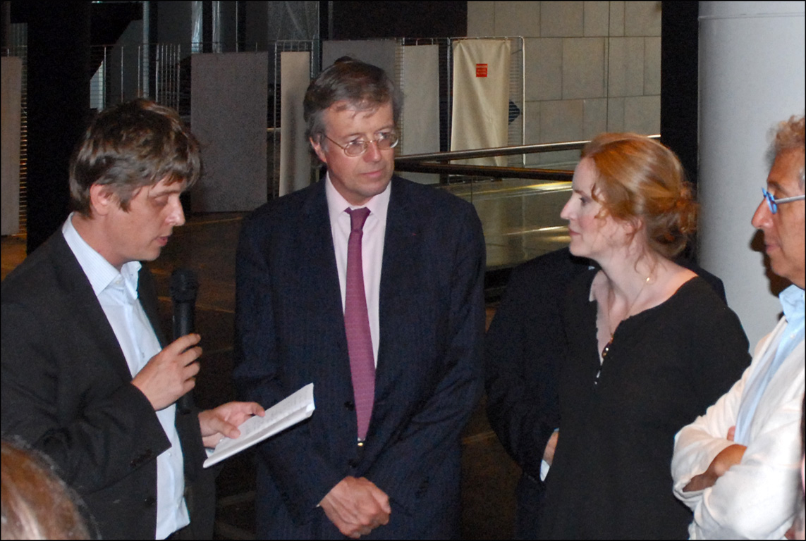 Discours d'accueil prononcé par Henri Verdier, président de Cap Digital à l'attention de Madame Nathalie Kosciusko-Morizet, Secrétaire d'Etat chargé de la Prospective et du Développement de l'économie numérique. Visite de l'exposition "Making Of" présentant les prototypes mis à l'honneur pendant Futur en Seine à la Cité des sciences et de l'industrie.